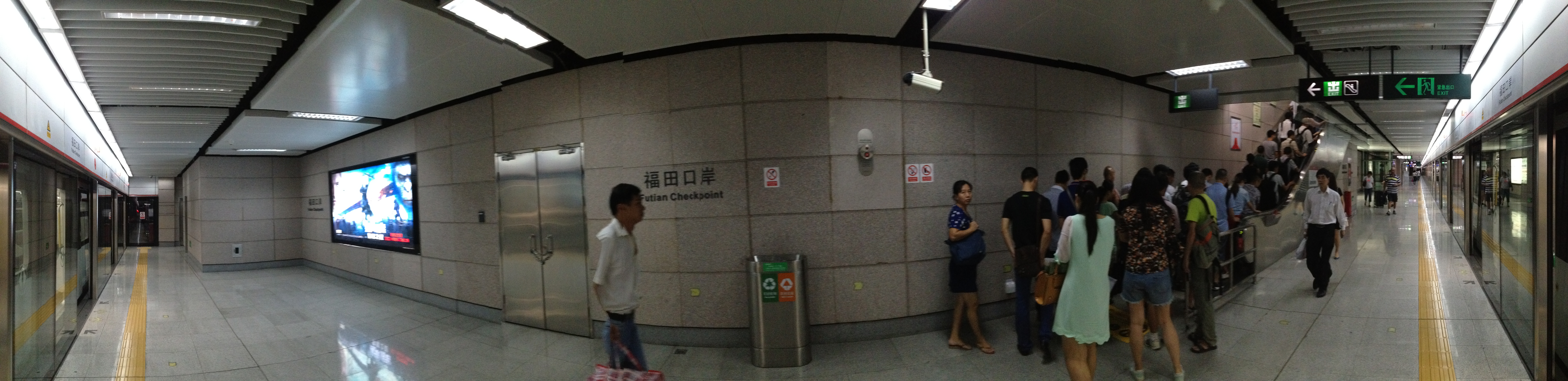 深圳地铁福田口岸站月台全景图